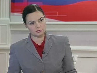 Екатерина Андреева, телеведущая